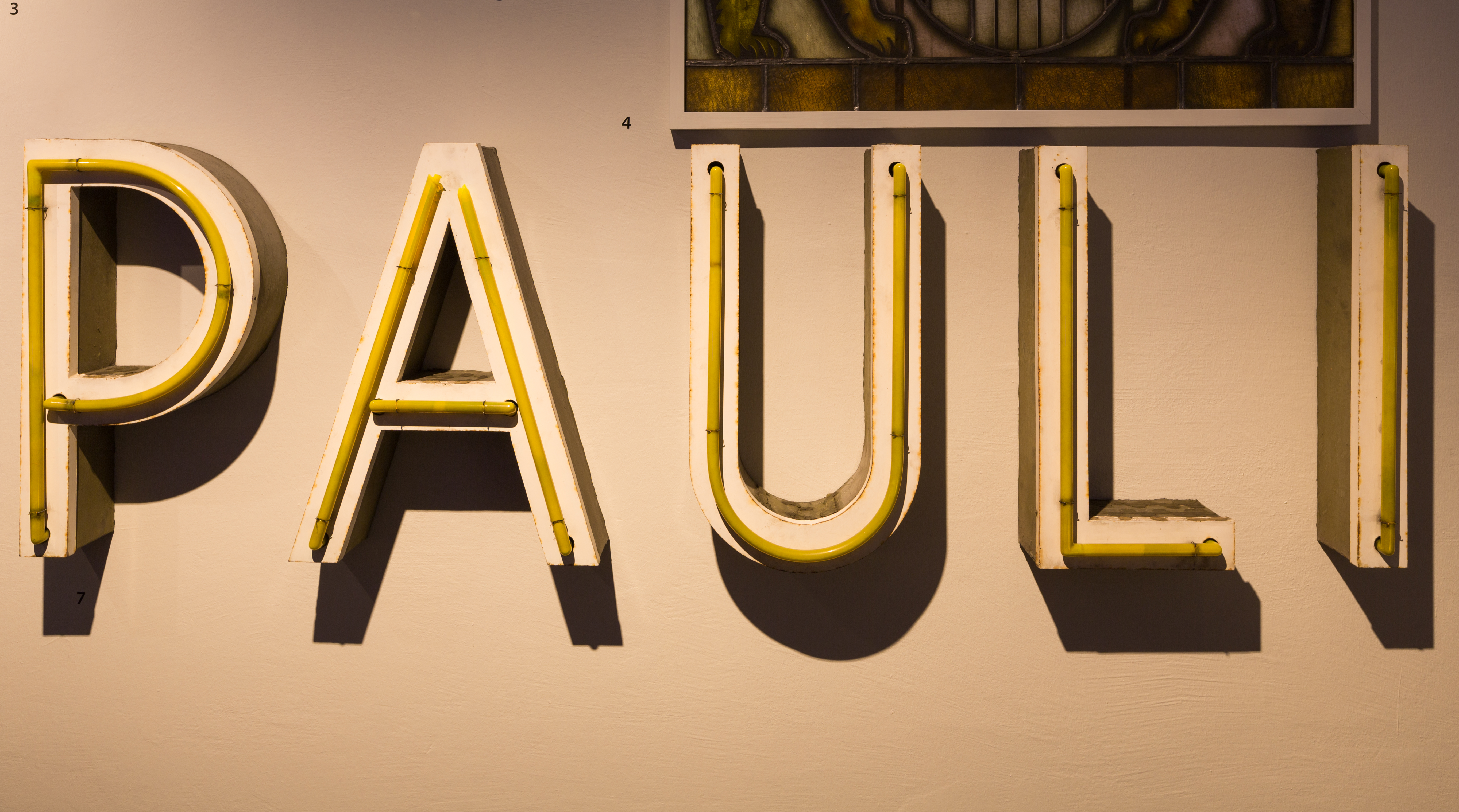 Ehemaliger Schriftzug des St. Pauli Theaters in Hamburg, Deutschland. Ausgestellt im Museum für Hamburgische Geschichte.